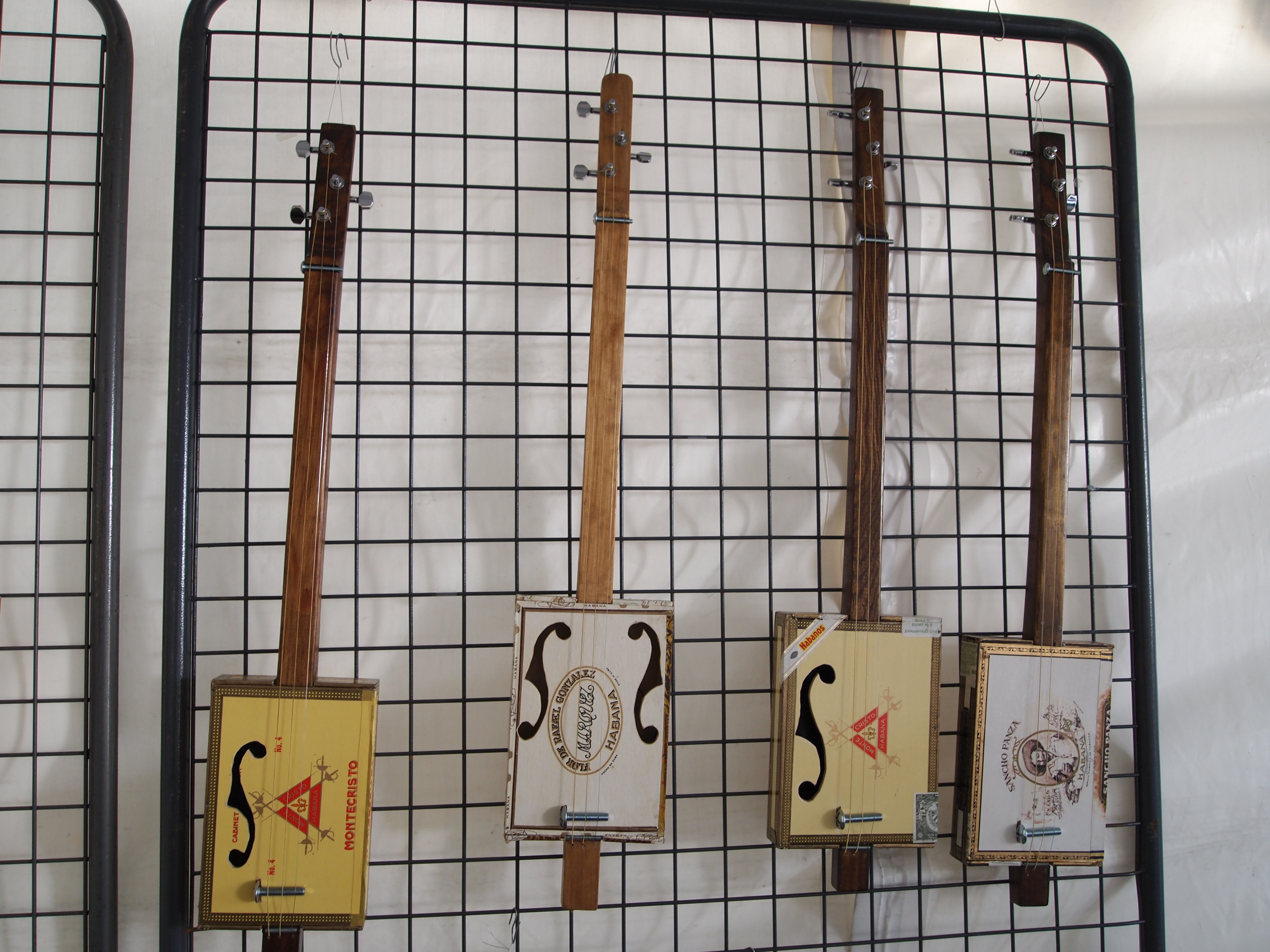 cigar box guitares exposées à Blues Passion 2011 à Cognac (Charente)